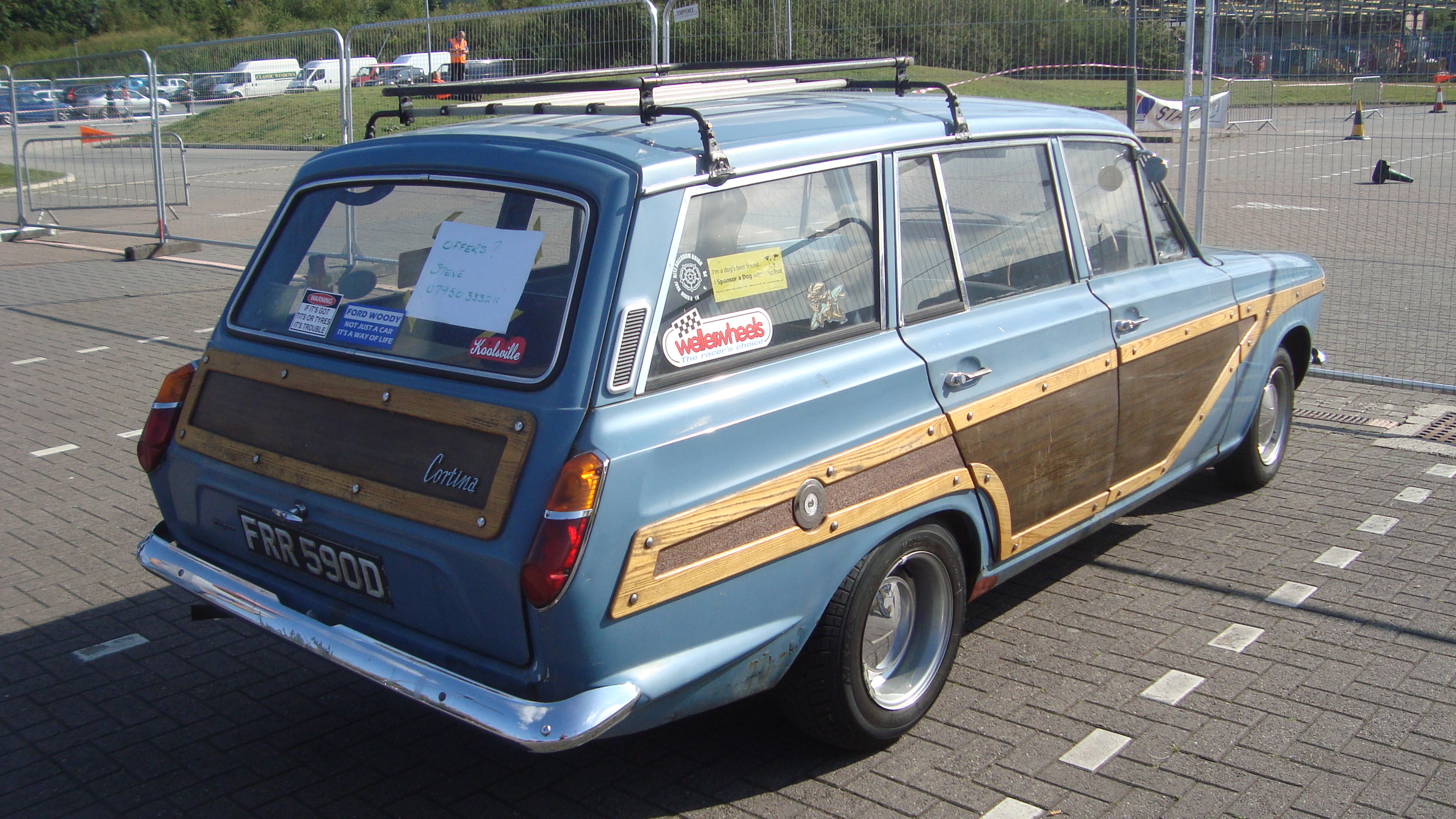 1966 Ford Cortina 1500 Super